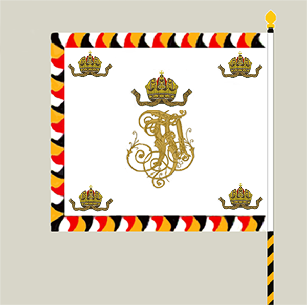 Rückseite der Truppenfahne der k.k. Landwehr